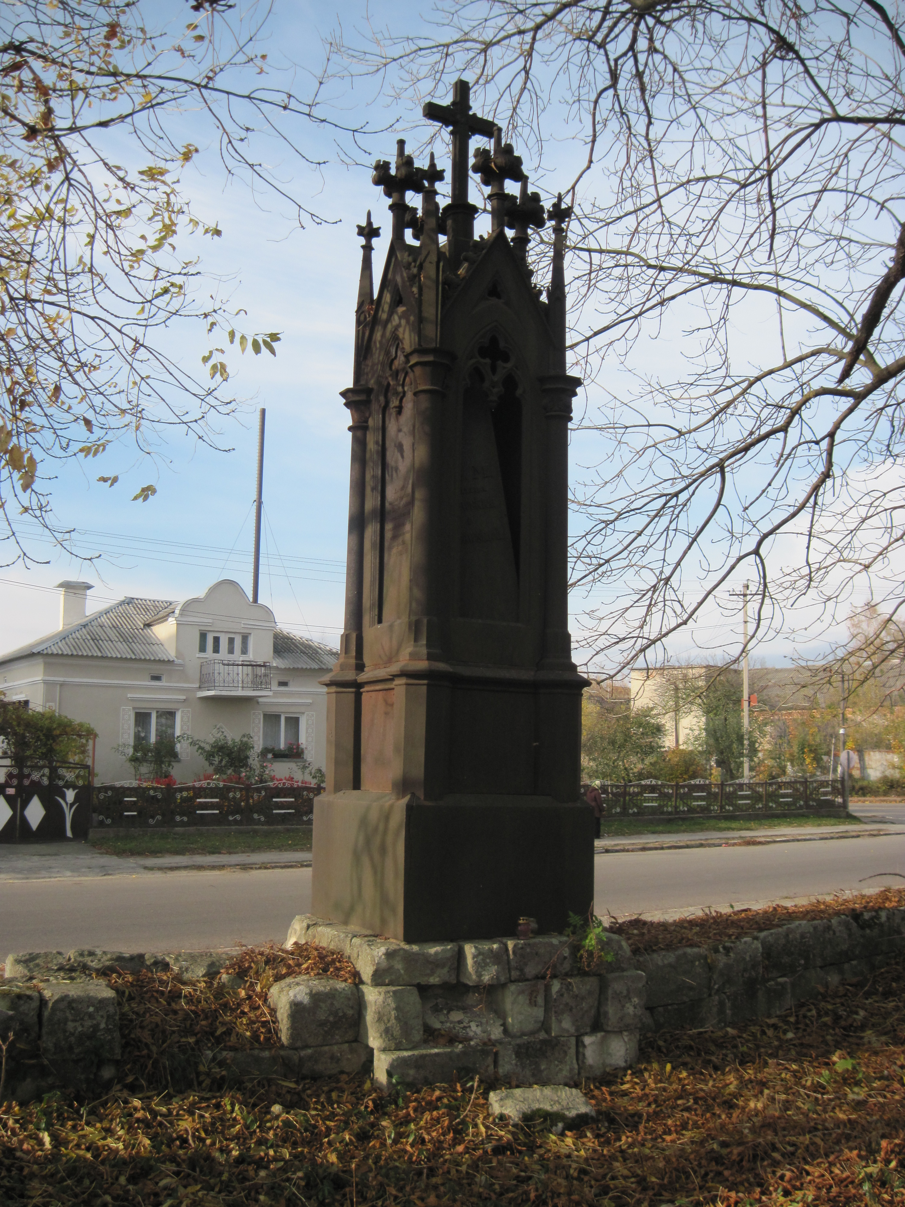 Збараж, старий цвинтар, 2014